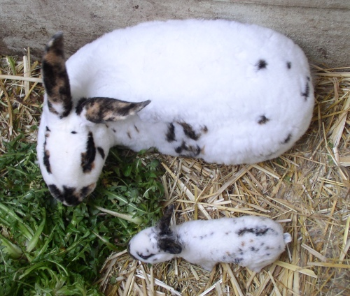 Hauskaninchen2 (Original text: Hauskaninchen)